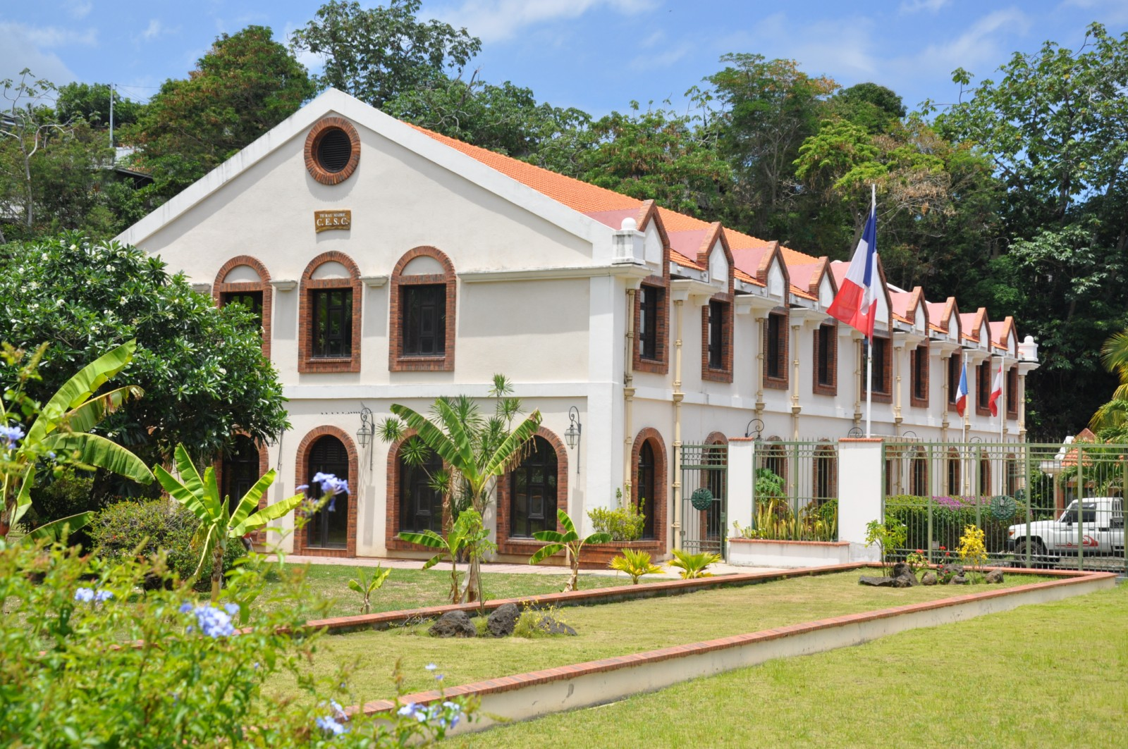 CESC à Papeete